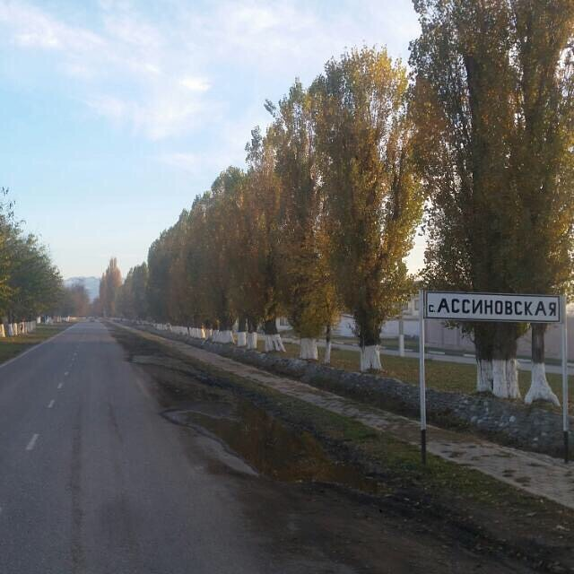 Въезд в станицу Ассиновская